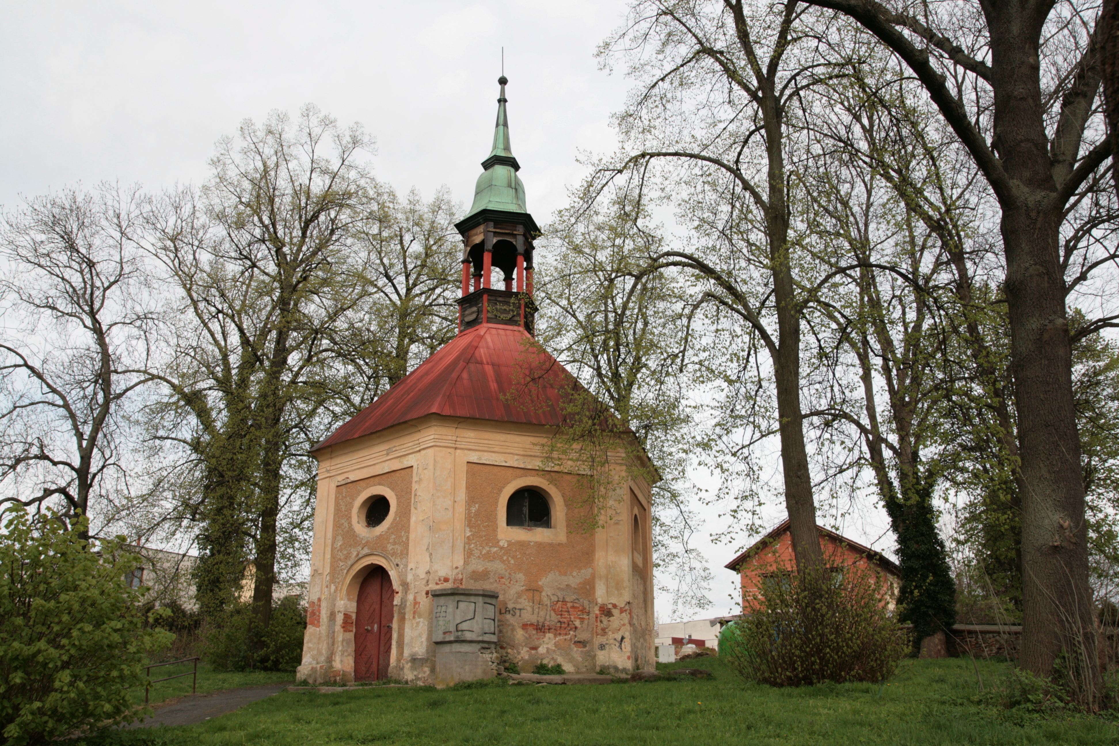 Město Domažlice. Hřbitovní kaple svatého Jana Nepomuckého při ulici Prokopa Velikého na Týnském Předměstí. Boční pohled od jihu.